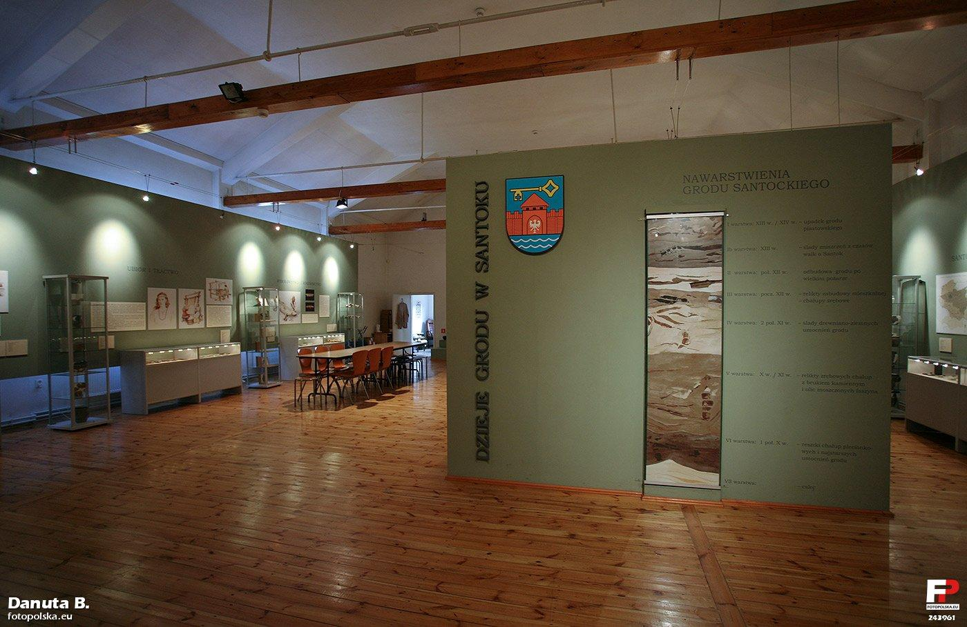 Profesjonalnie urządzone wnętrze muzeum, w którym eksponowane są głównie znaleziska archeologiczne. Budynek dawnej gospody.